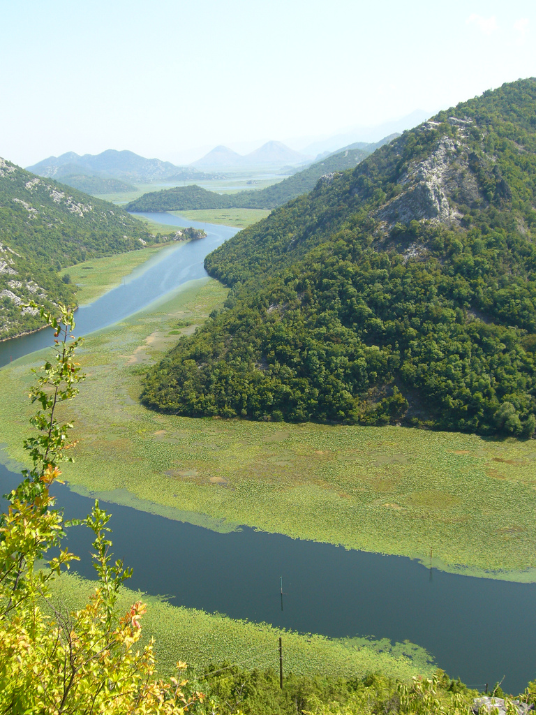 chissà di cos'era fatta quella robina verde...